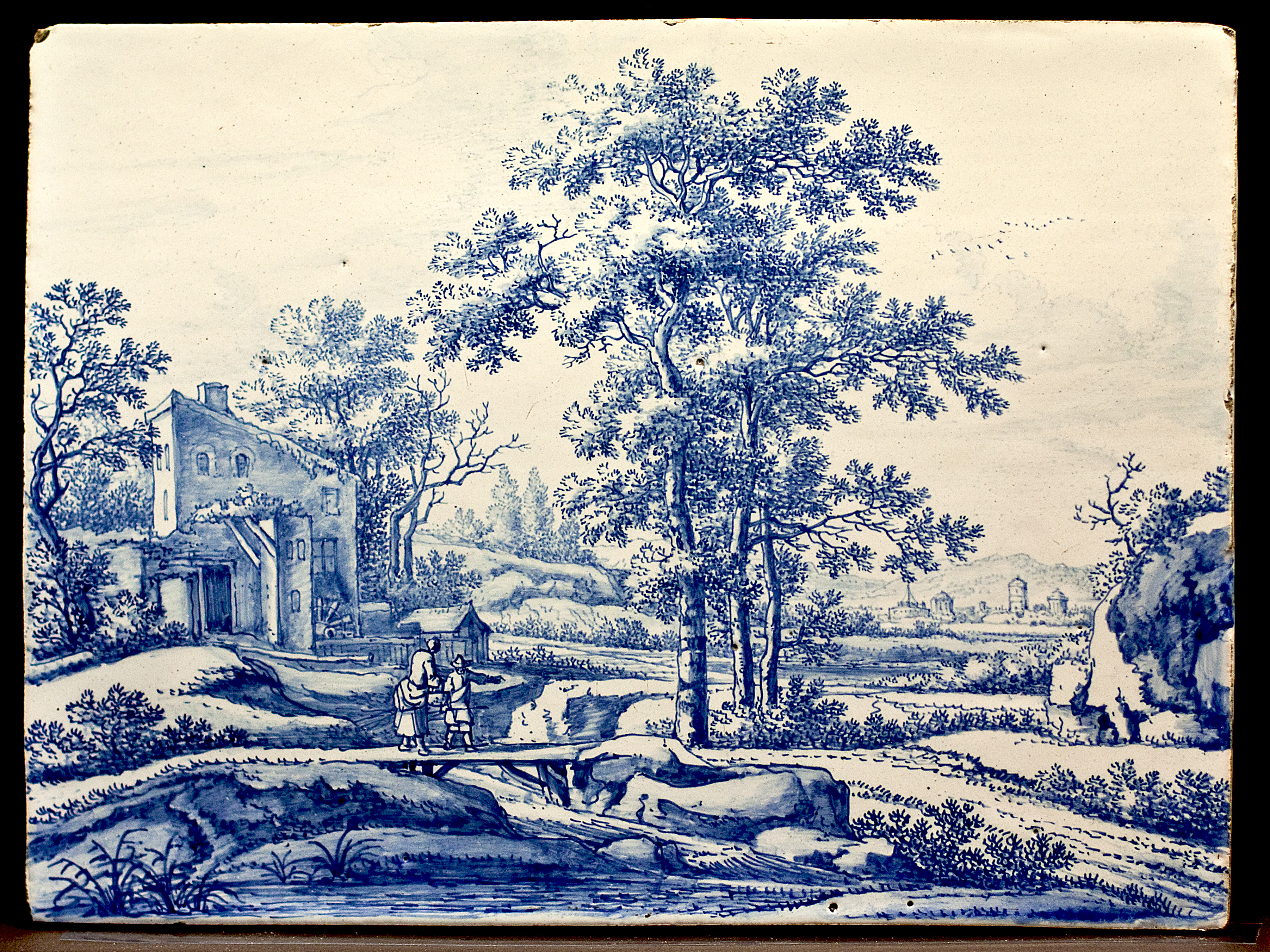 Vitrine Majolica en Delfts aardewerk (Toegepaste kunst en Design, zaal 44) Country: Netherlands City: Rotterdam Location: Museum Boymans van Beuningen Artist: Frederik van Frijtom Name: Landschap met rivier, 1650-1700